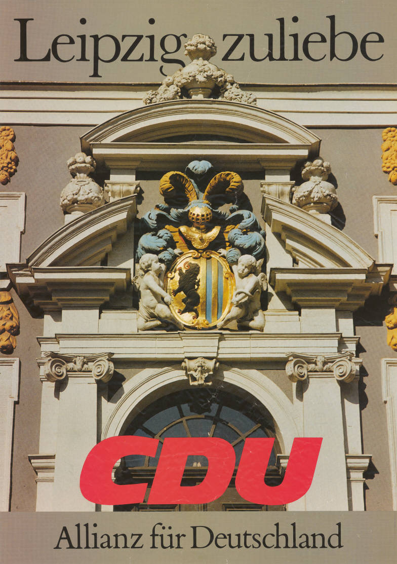 Leipzig zuliebe CDU Allianz für Deutschland Abbildung: Historisches Stadtwappen Kommentar: Evtl. auch bei der Kommunalwahl 1990 eingesetzt. Plakatart: Motiv-/Textplakat Objekt-Signatur: 10-024 : 5063 Bestand: Plakate aus der SBZ/DDR (10-024) GliederungBestand10-18: Plakate aus der SBZ/DDR (10-024) » Wahl zur Volkskammer am 18.3.1990 » CDU Lizenz: KAS/ACDP 10-024 : 5063 CC-BY-SA 3.0 DE